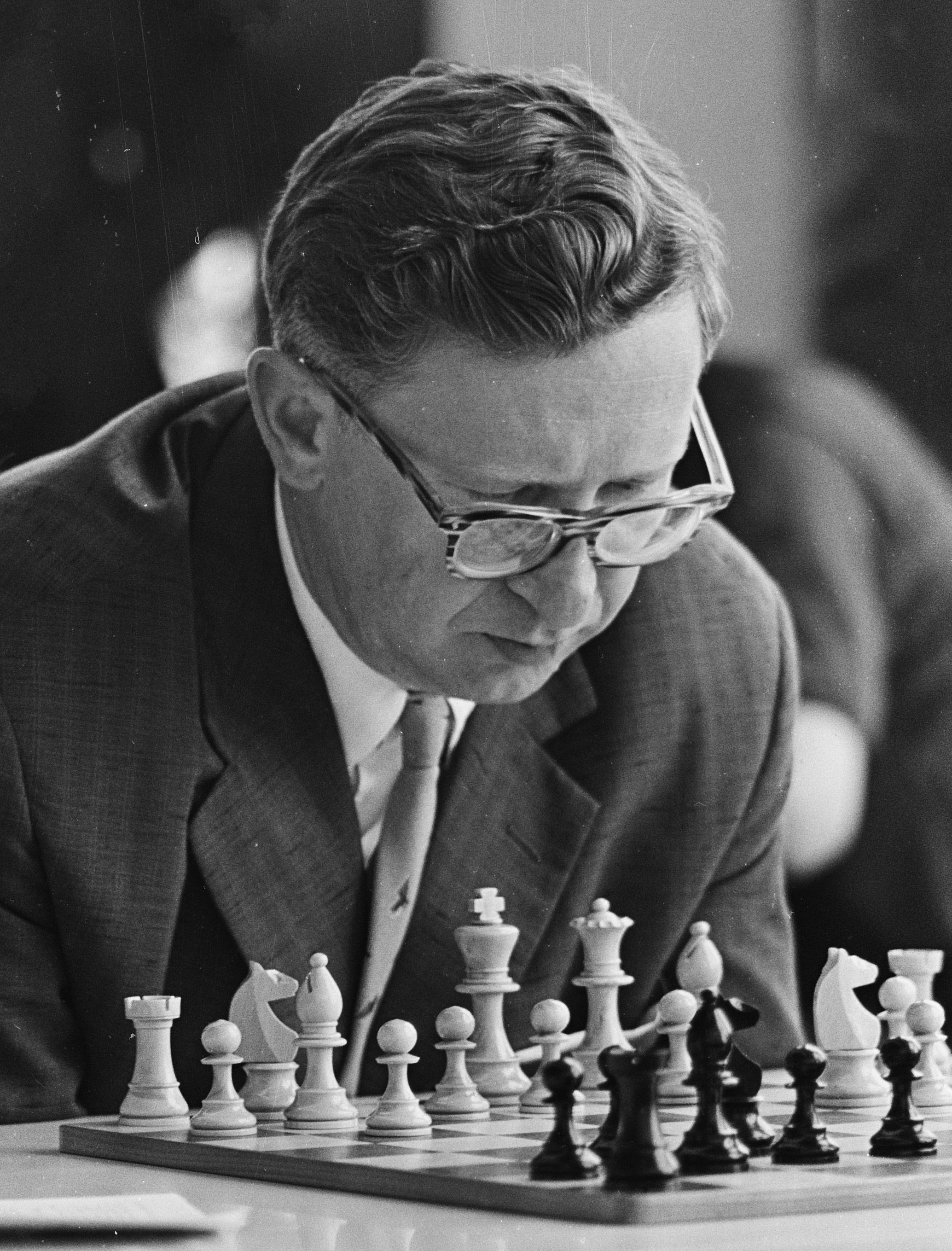 Collectie / Archief : Fotocollectie Anefo Reportage / Serie : [ onbekend ] Beschrijving : Interzonaal fide schaaktoernooi in GAK gebouw. Smyslov vs. Larsen Datum : 26 mei 1964 Trefwoorden : SCHAAKTOURNOOIEN Instellingsnaam : GAK Fotograaf : Pot, Harry / Anefo Auteursrechthebbende : Nationaal Archief Materiaalsoort : Negatief (zwart/wit) Nummer archiefinventaris : bekijk toegang 2.24.01.05 Bestanddeelnummer : 916-4756